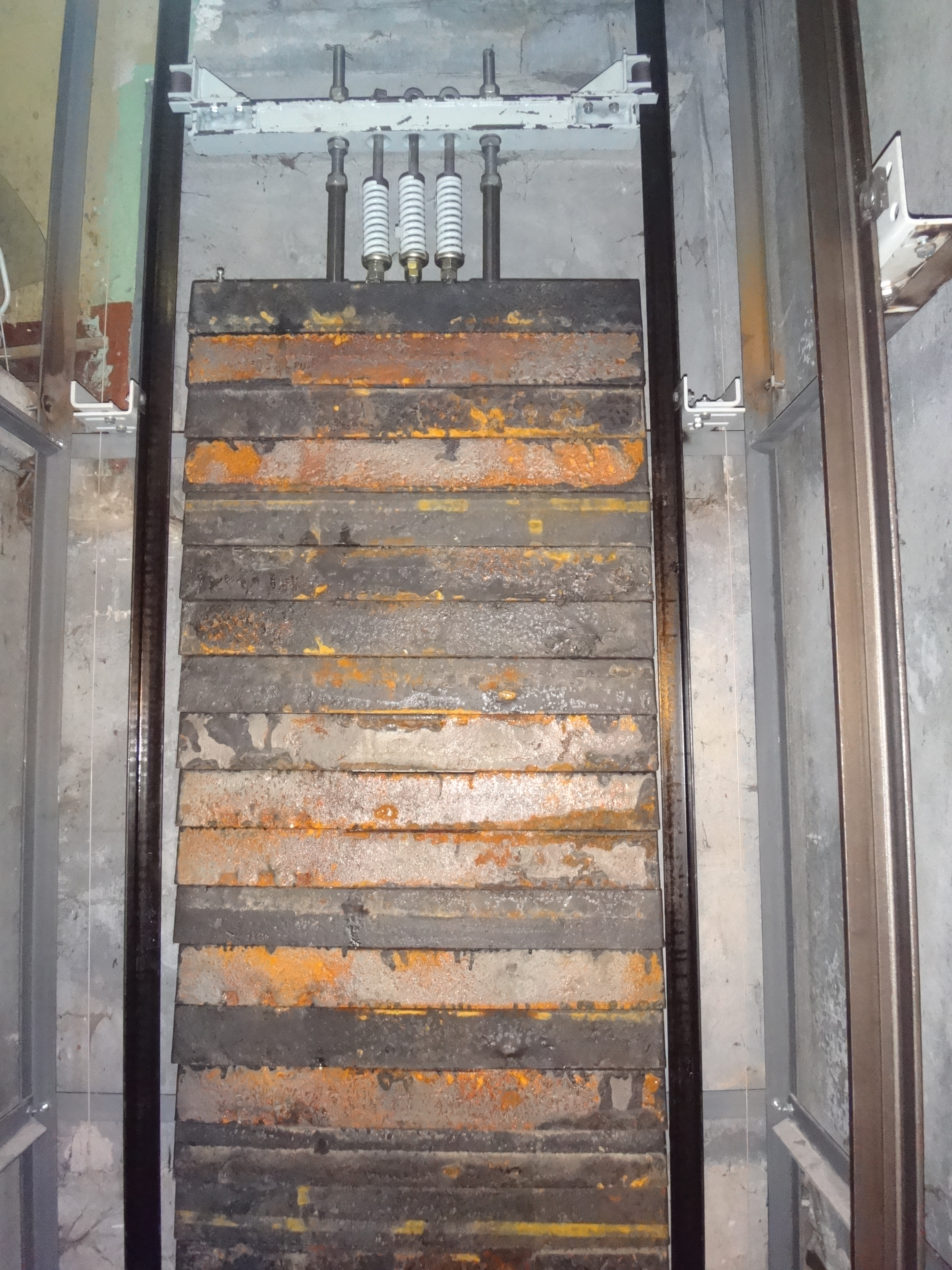 Лифтовый противовес